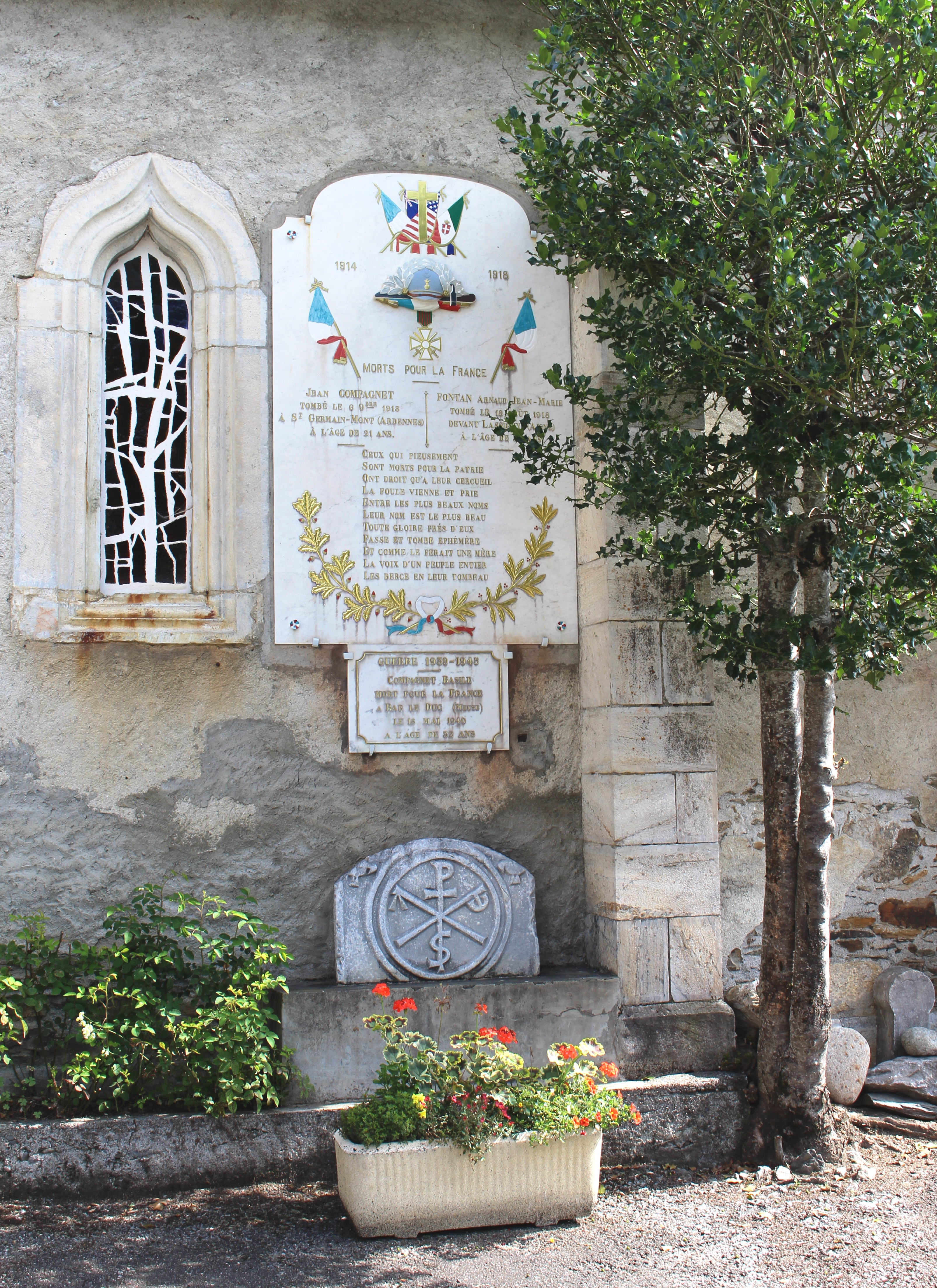 Monument aux morts de Barrancoueu (Hautes-Pyrénées)